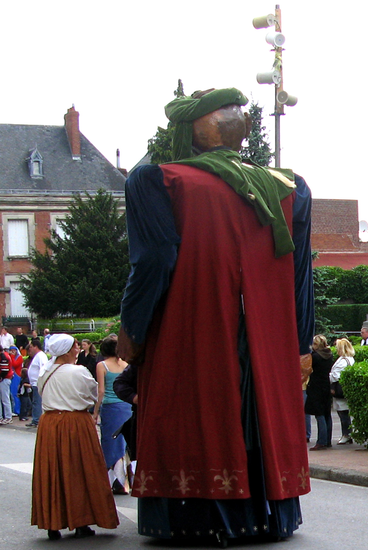 Ham (Somme, France) - Animation festive au centre-ville, un dimanche de printemps. Le géant Rigobert passe devant l'hôtel-de-ville. Sur cette photo, on peut remarquer que le géant est équipé de roulettes.